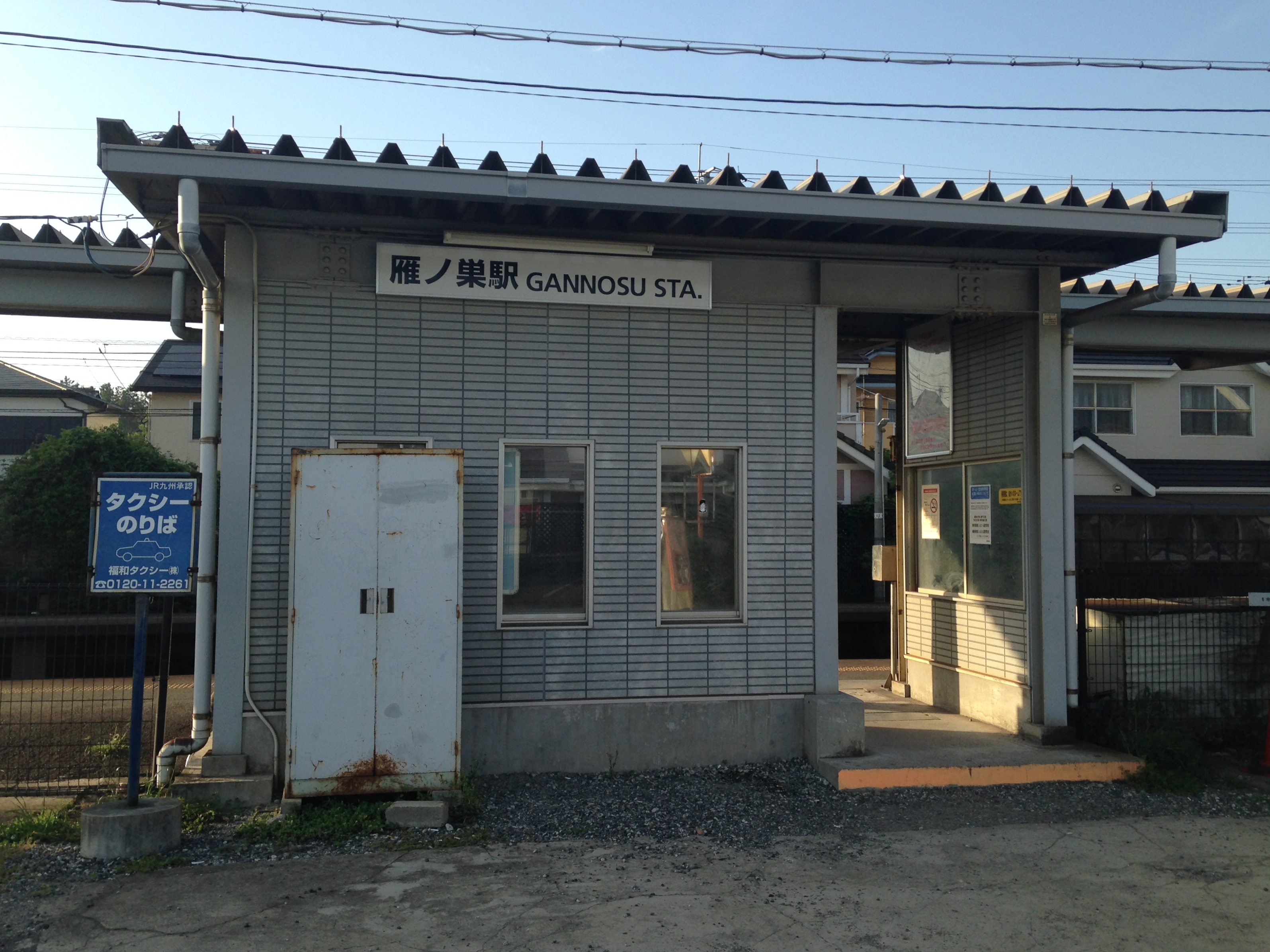 雁ノ巣駅駅舎